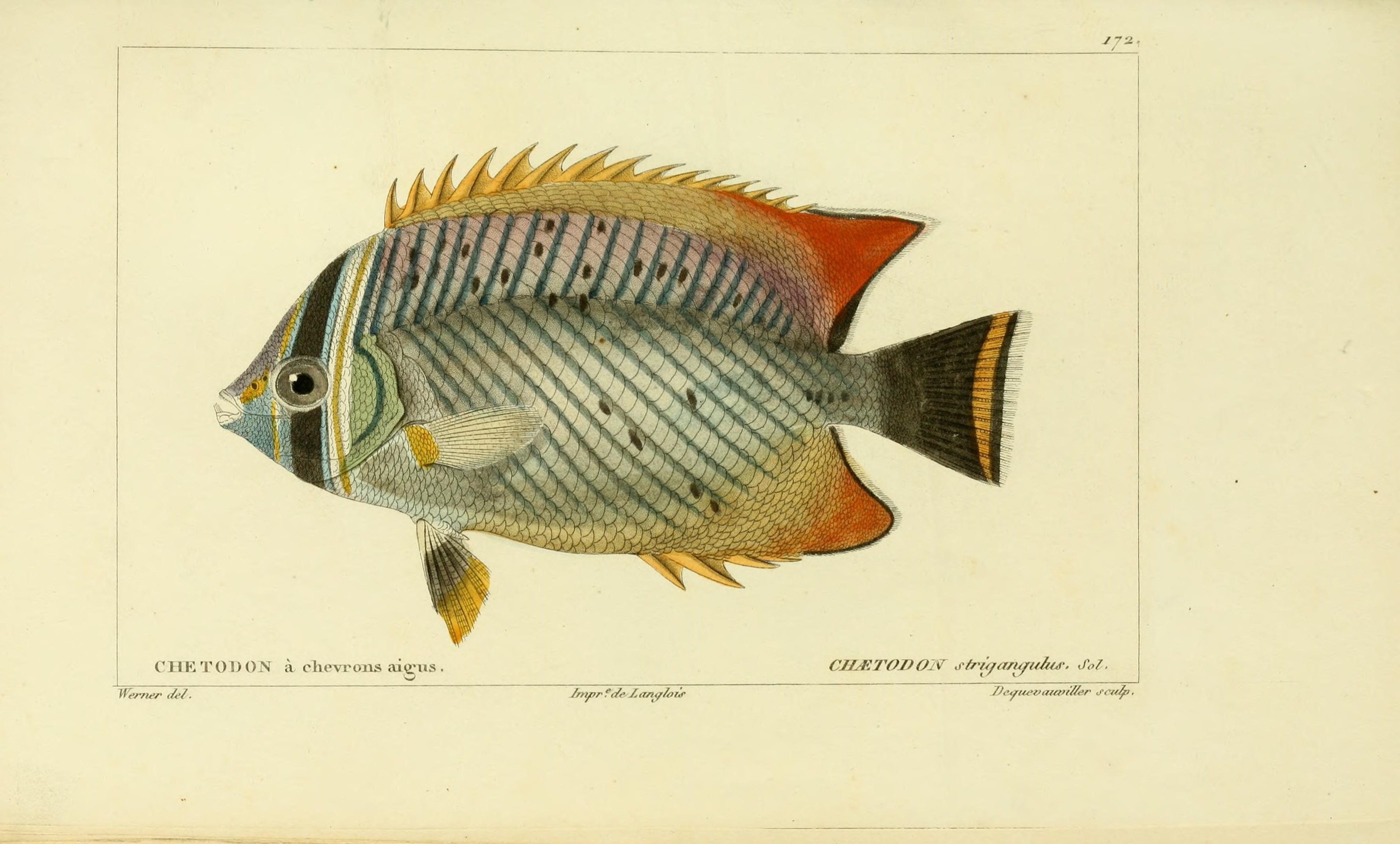 Histoire naturelle des poissons color plates 141-255